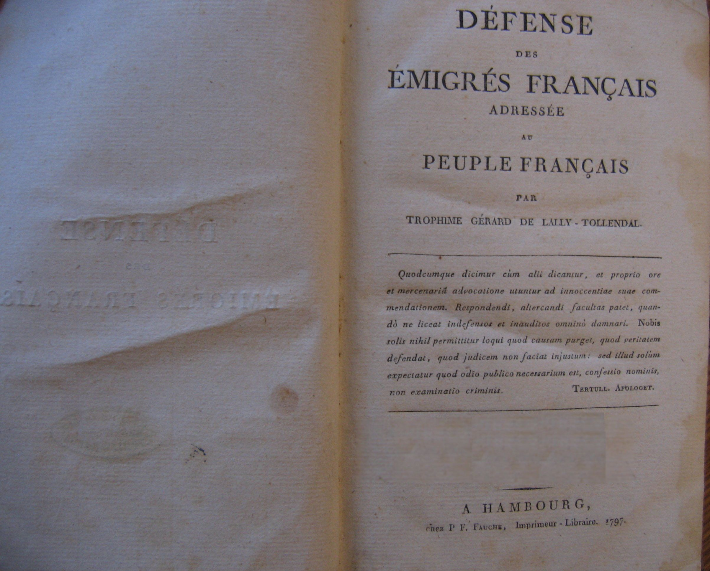 Lally-Tollendal. Page de titre